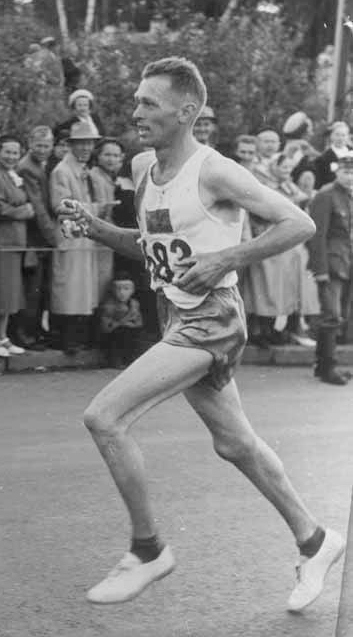 Gustaf Jansson, Helsinki Olympics